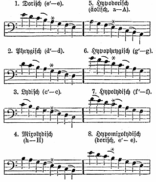 Die sieben Oktavgattungen der alten griechischen Musik Quelle: Meyers Konversationslexikon